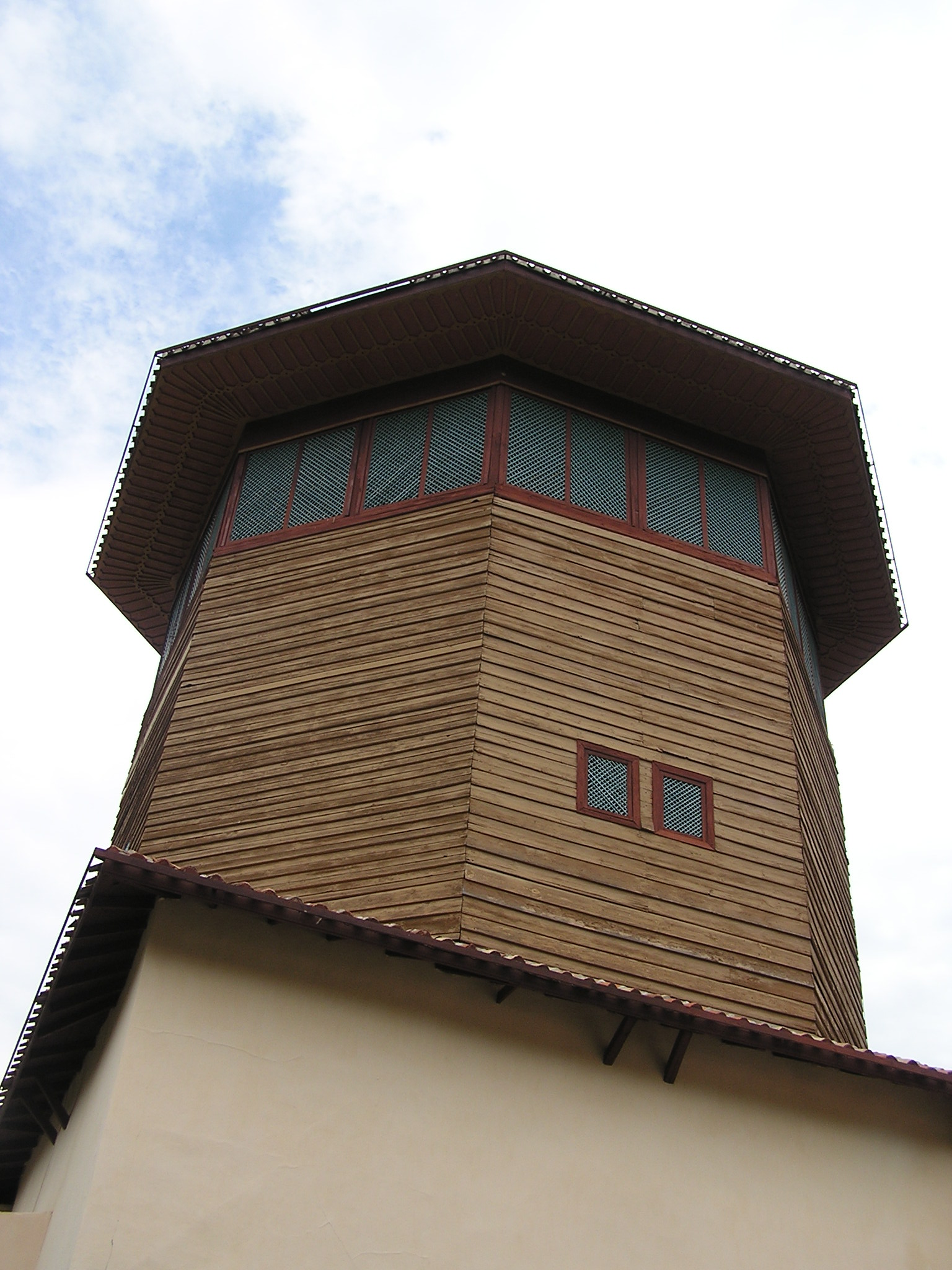 Бахчисарайский дворец